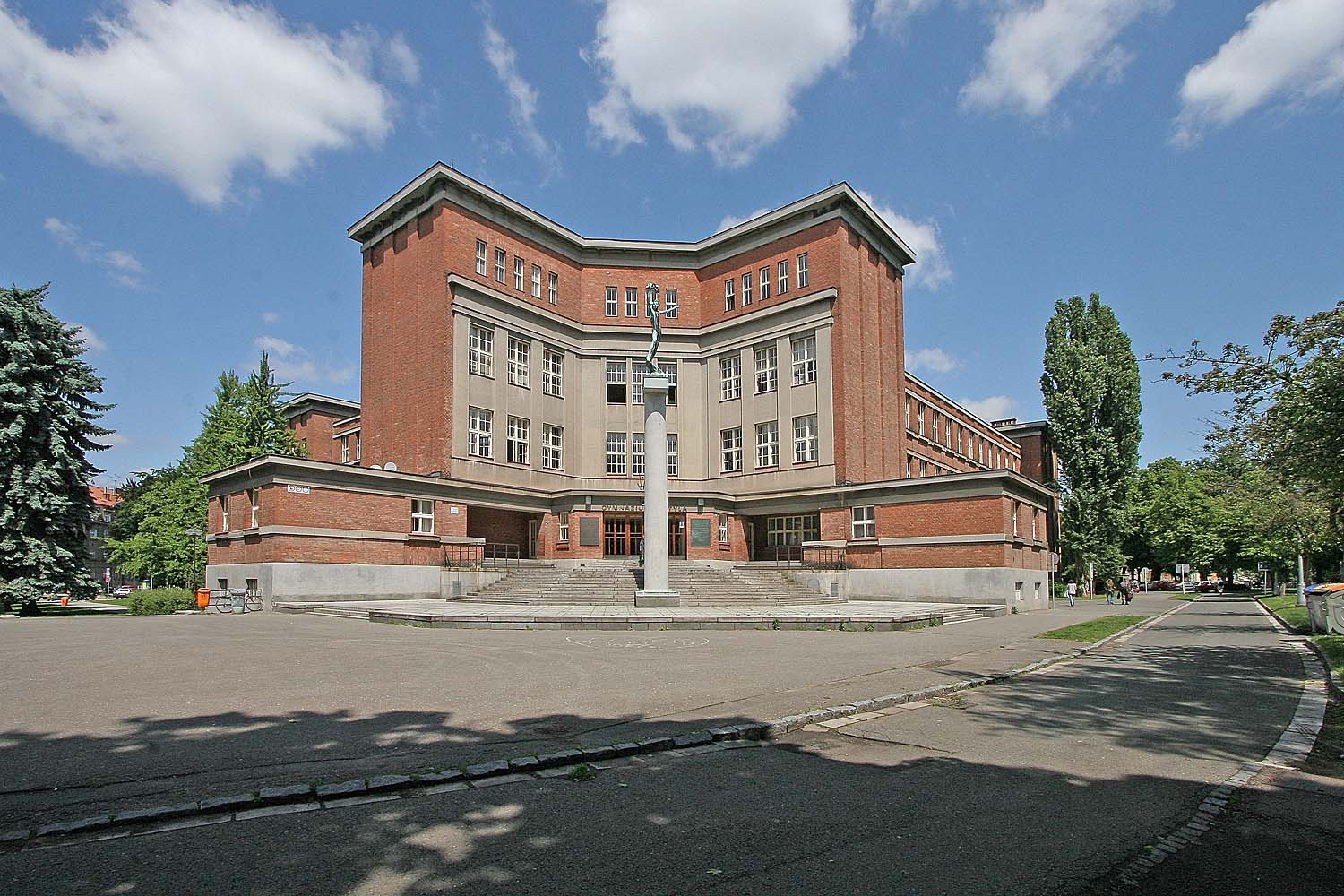 Hradec Králové - budova gymnázia_Josefa_Kajetána_Tyla